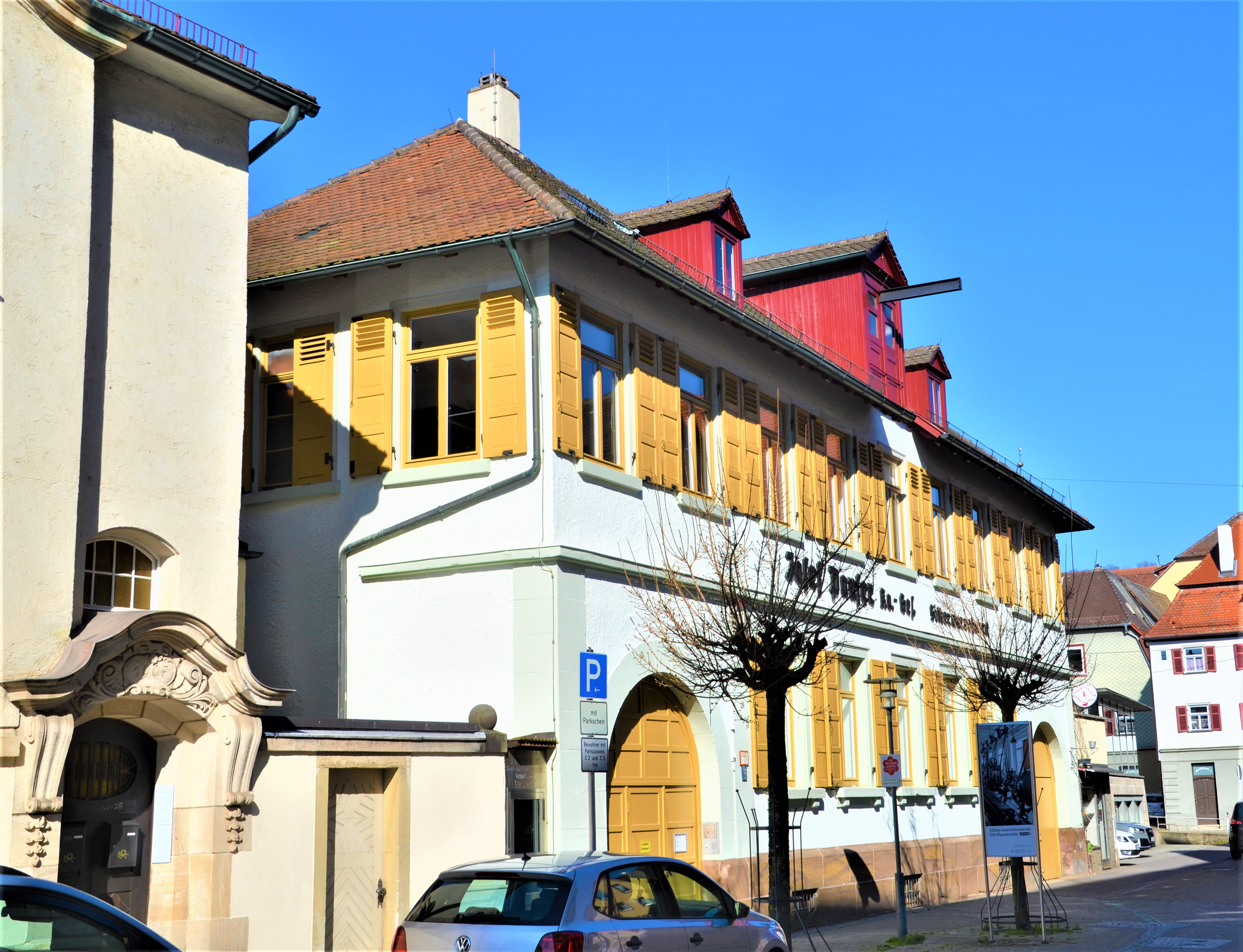 Ott Pauschersche Fabrick in Schwäbisch Gmünd